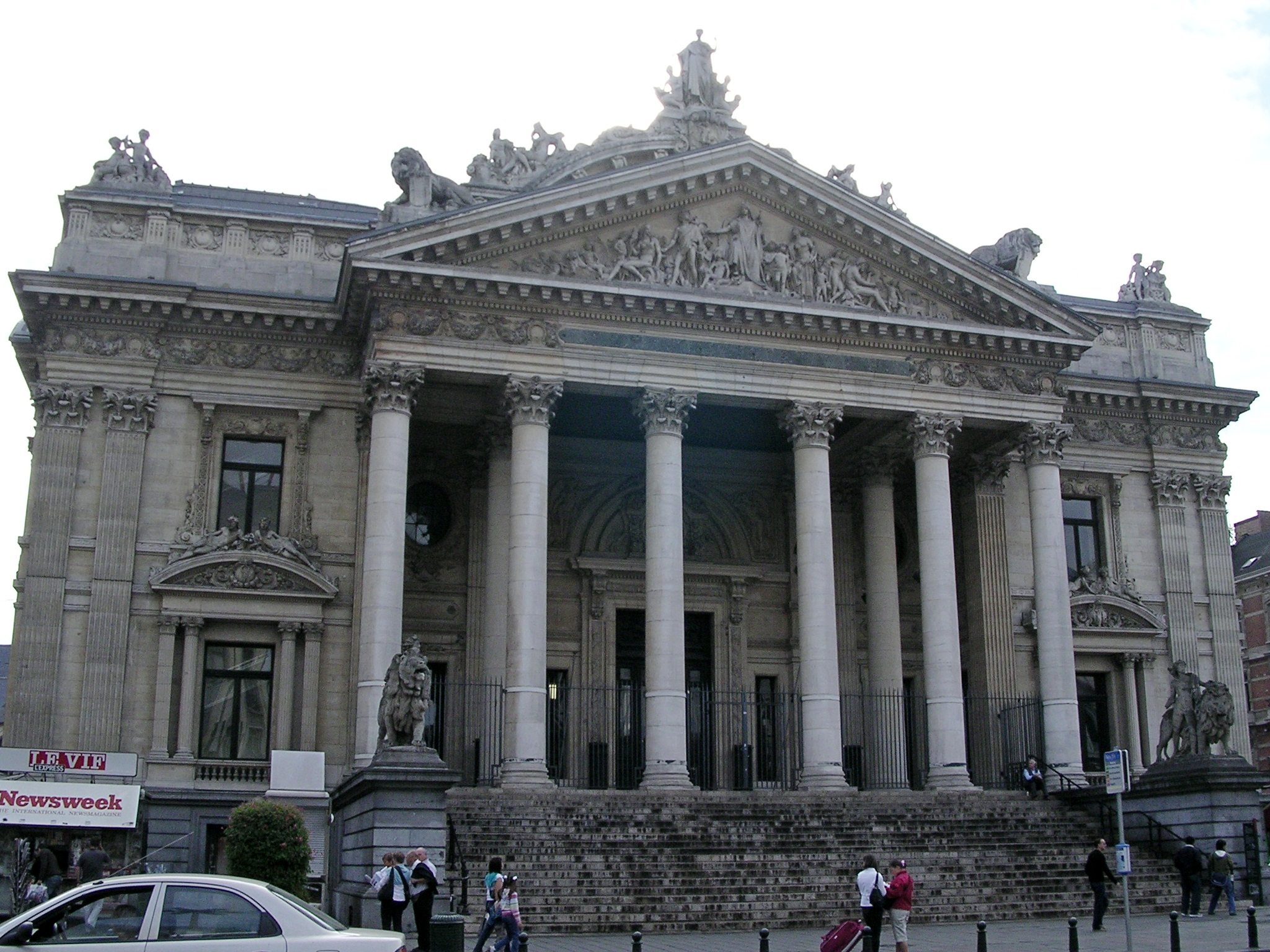 façade - architecte Léon SUYS - 19ème siècle